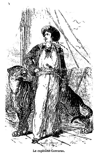 illustration d'Alphonse de Neuville pour le 1er volume du livre Les Aventures (merveilleuses mais authentiques) du capitaine Corcoran d'Alfred Assollant.